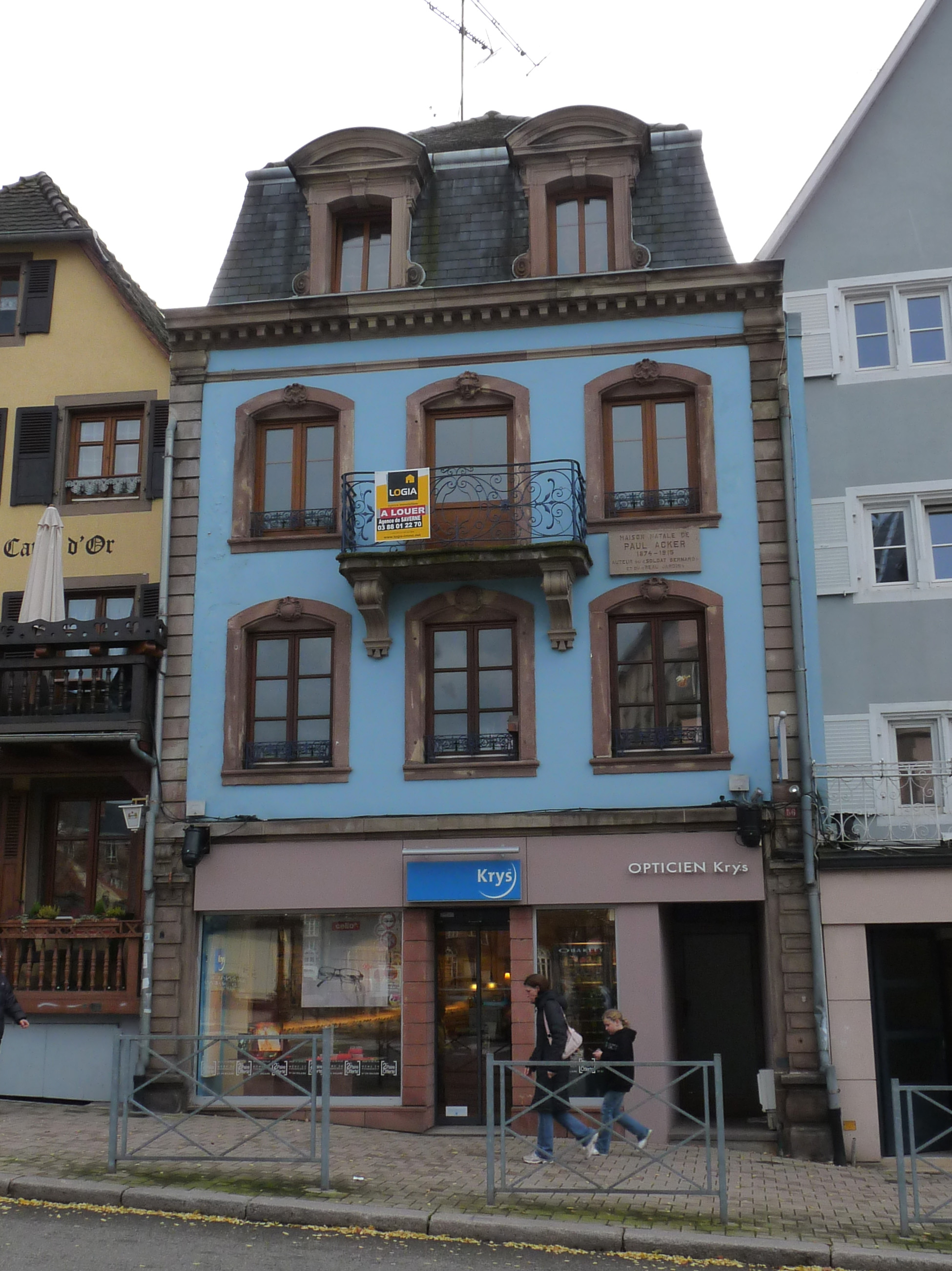 Plaque commémorative sur la maison natale de Paul Acker à Saverne, 35 Grand Rue (Bas-Rhin)